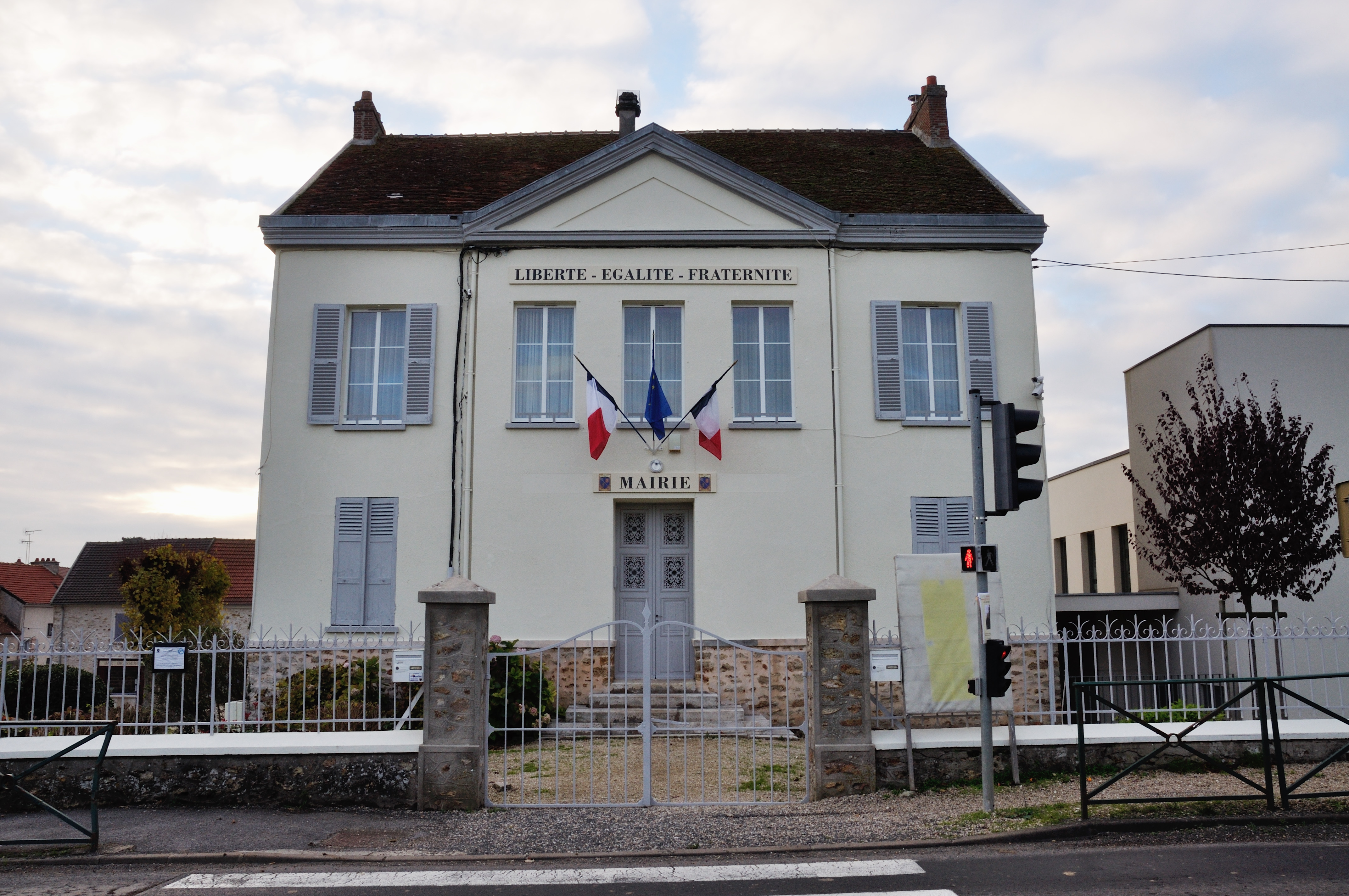 Mairie de Maisoncelles-en-Brie. (département de la Seine et Marne, région Île-de-France).